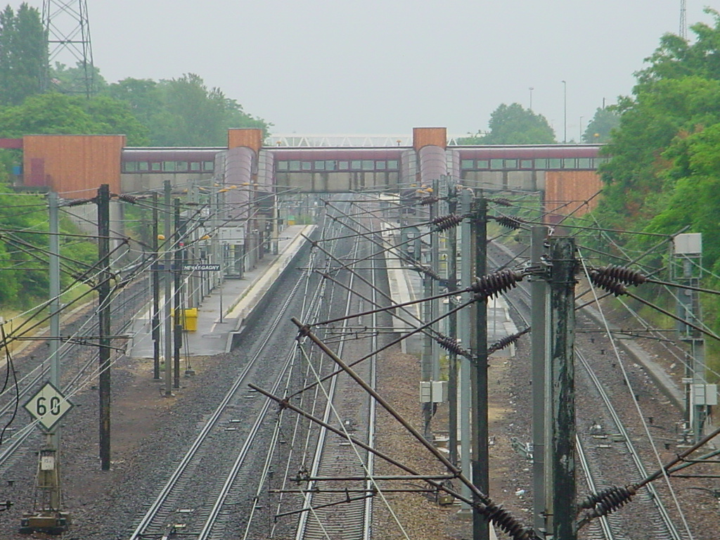 Gare de Gagny-Chénay en France département Seine-Saint-Denis.